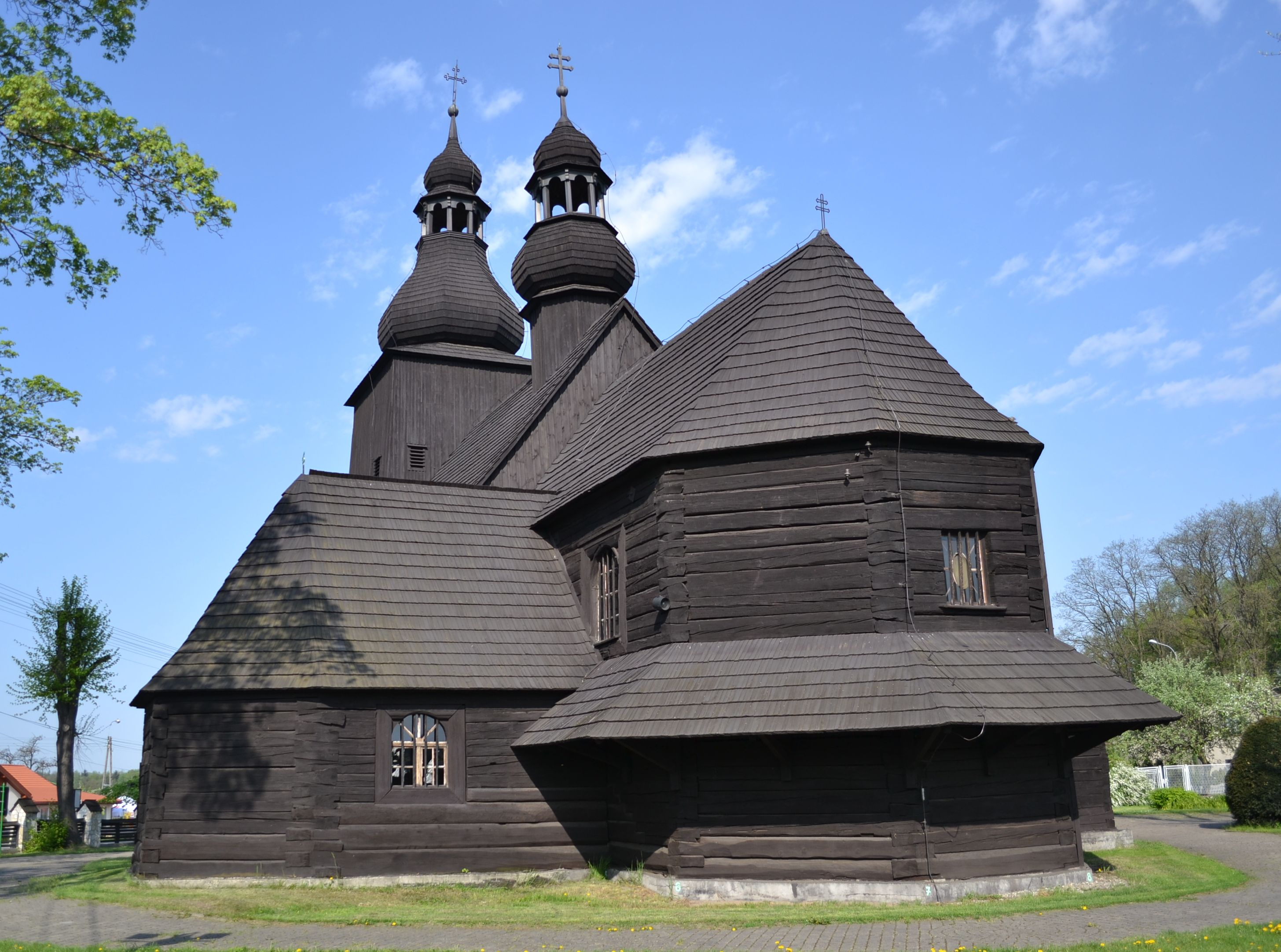 Borowa Wieś, kościół drewniany